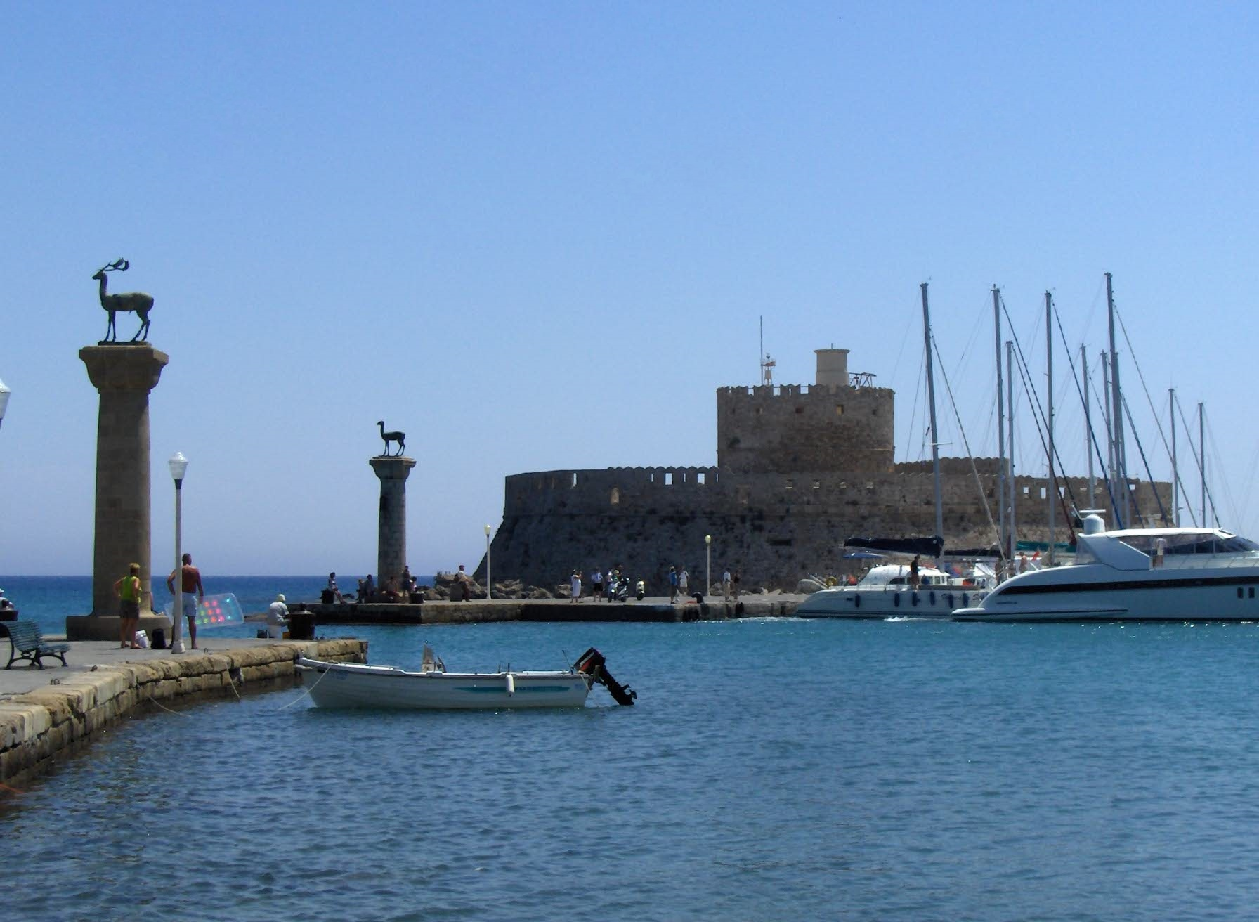 Port Mandraki (tu niegdyś stał Kolos Rodyjski), miasto Rodos